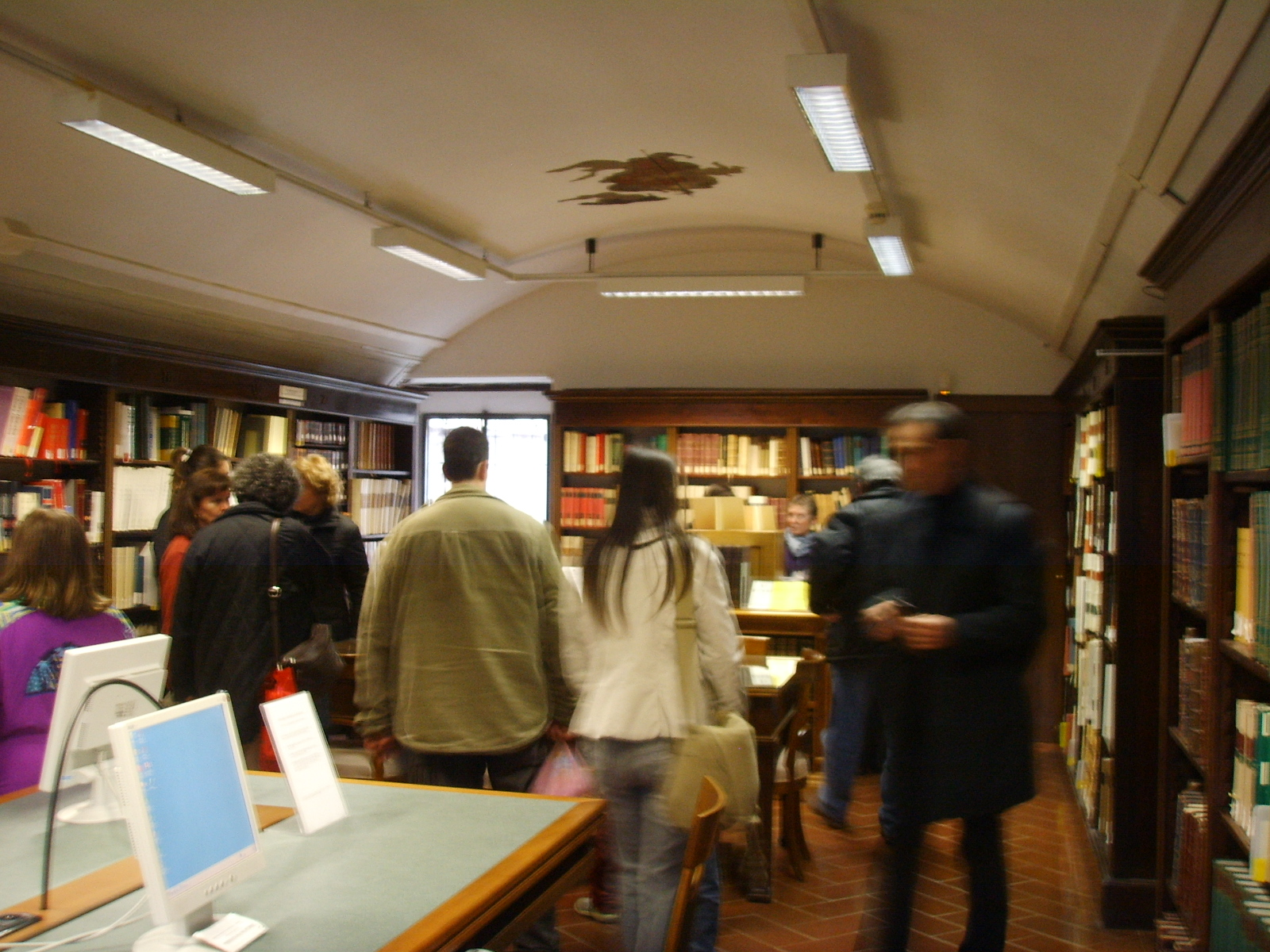 Biblioteca medicea laurenziana sala lettura moderna